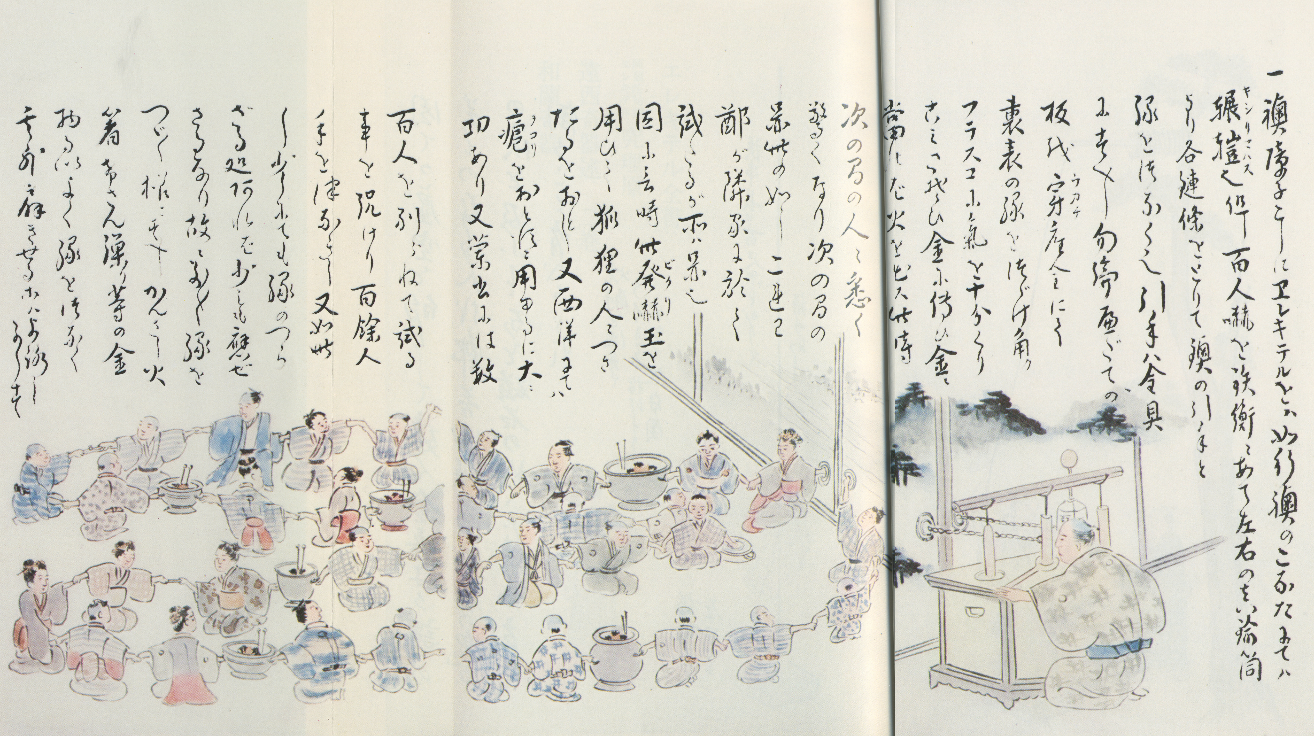 橋本宗吉著「阿蘭陀始制エレキテル究理原」のエレキテルによる百人怯え実験の絵